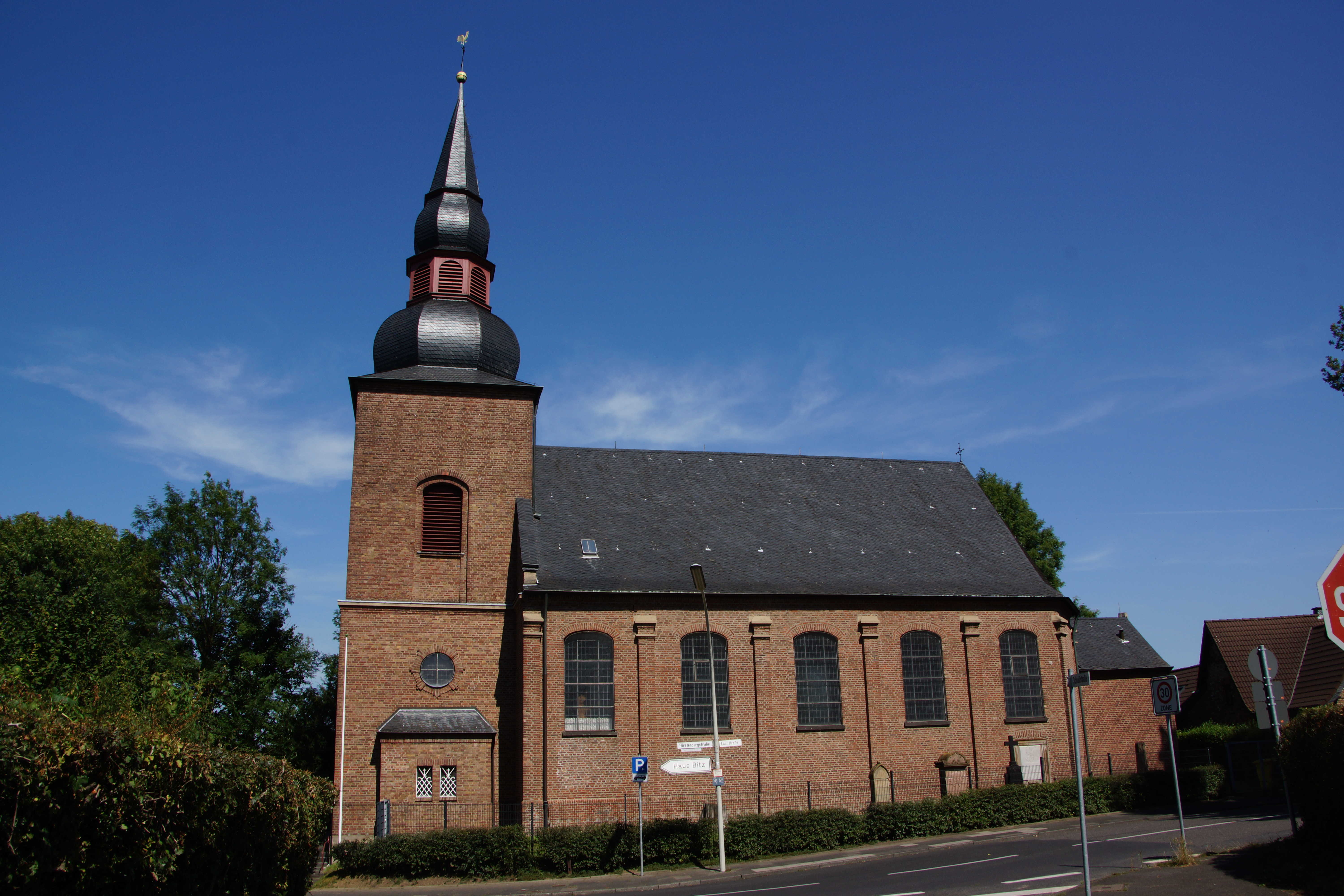 alte katholische Kirche Sankt Mauritius Frechen-Bachem